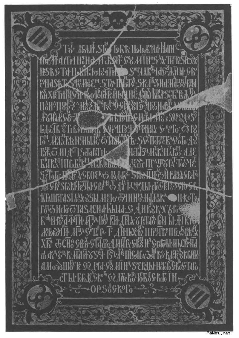 Дзікушкі. Прамалёўка надмагілля Марыны Тышкевіч з кнігі Яўстаха Тышкевіча.